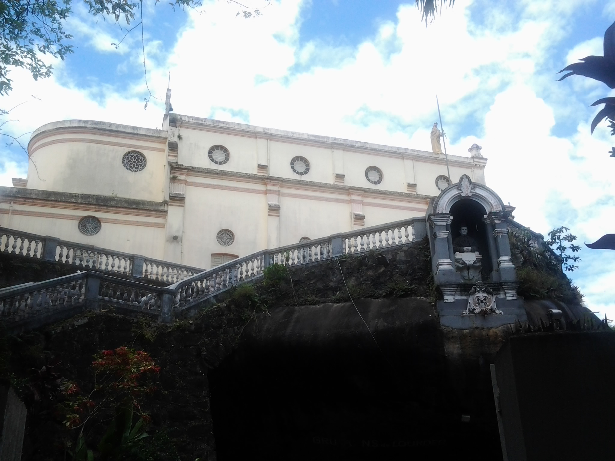 Colônia dos Padres - Jaboatão dos Guararapes